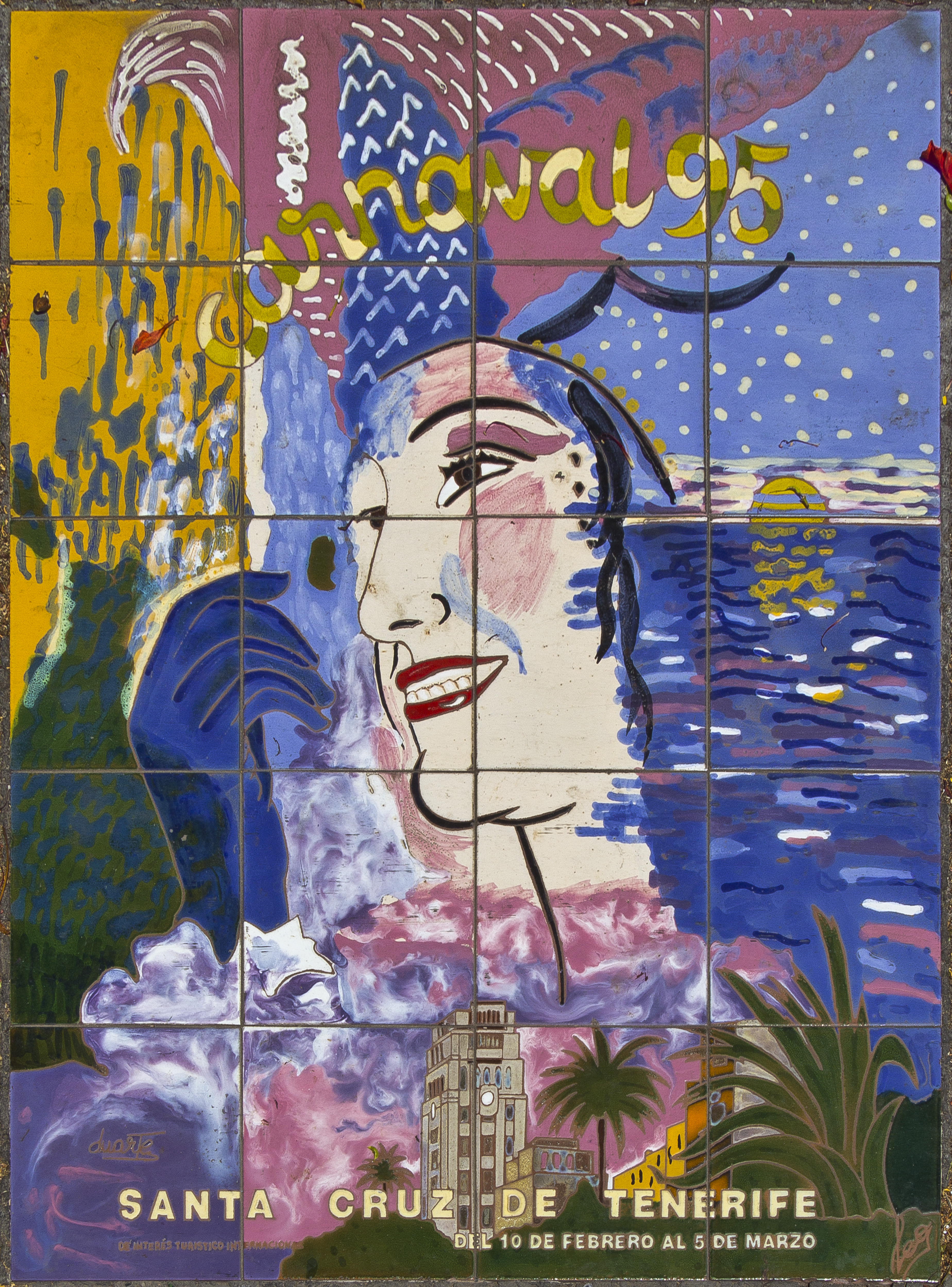 Im Dezember 1996 wurde in Santa Cruz de Tenerife eine Promenade zu Ehren der Gestalter der Karnevalsplakate eröffnet. Dort ist eine große Anzahl der Plakate als „Azulejo“ im Boden eingelassen dargestellt.